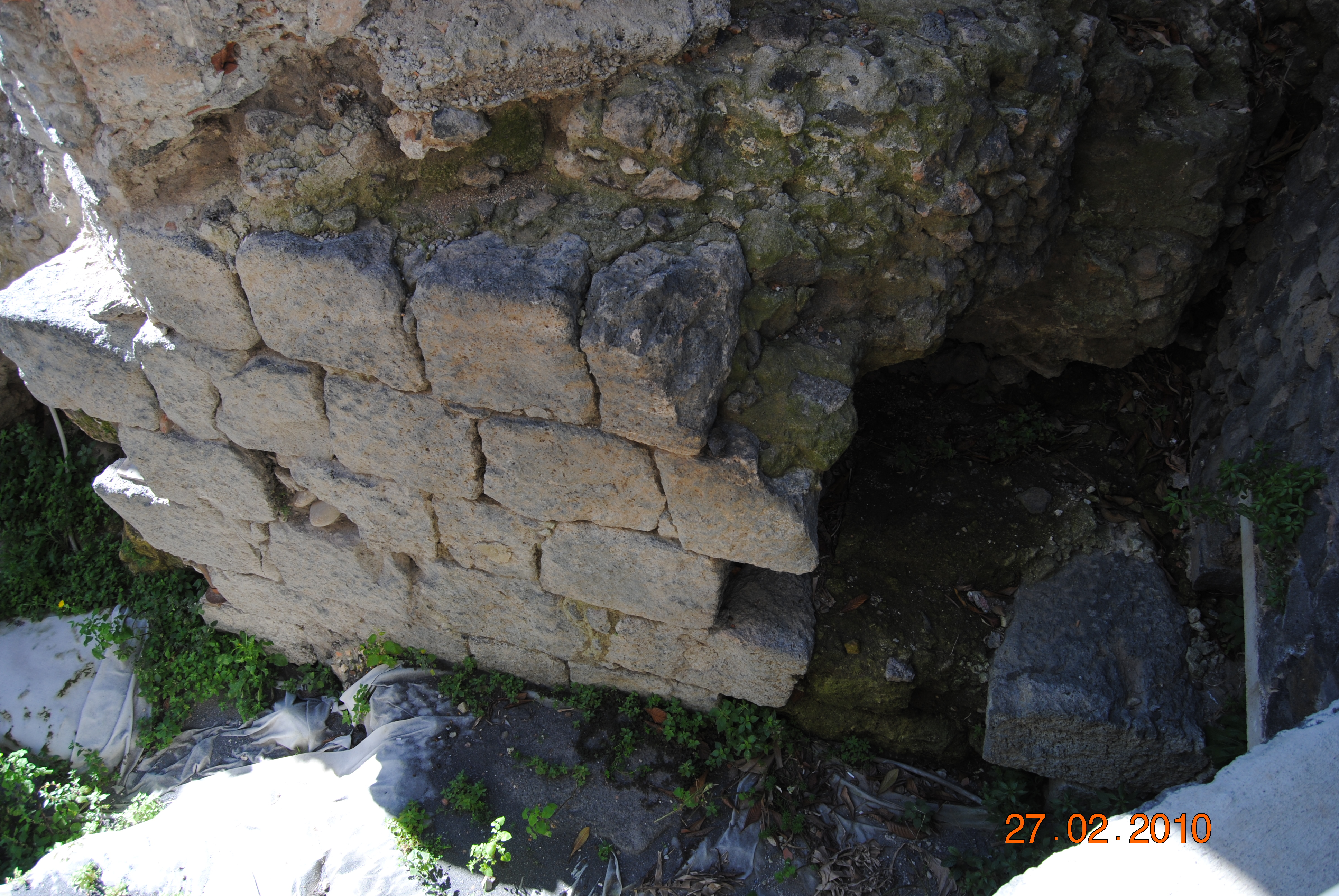 Porzione di mura del Teatro greco di Catania (arenaria), restaurato in epoca romana (pietra lavica).